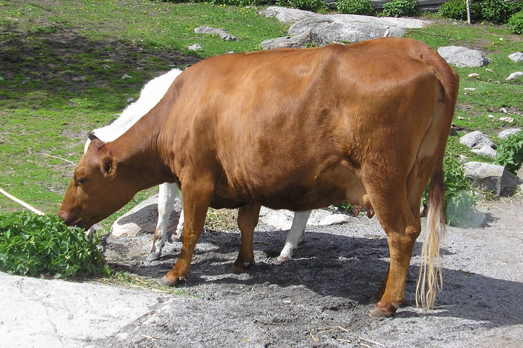 Rödbroka / Rödkulla (aka SRB, Svensk Röd Boskap) a traditional swedish breed no longer used in commercial production.